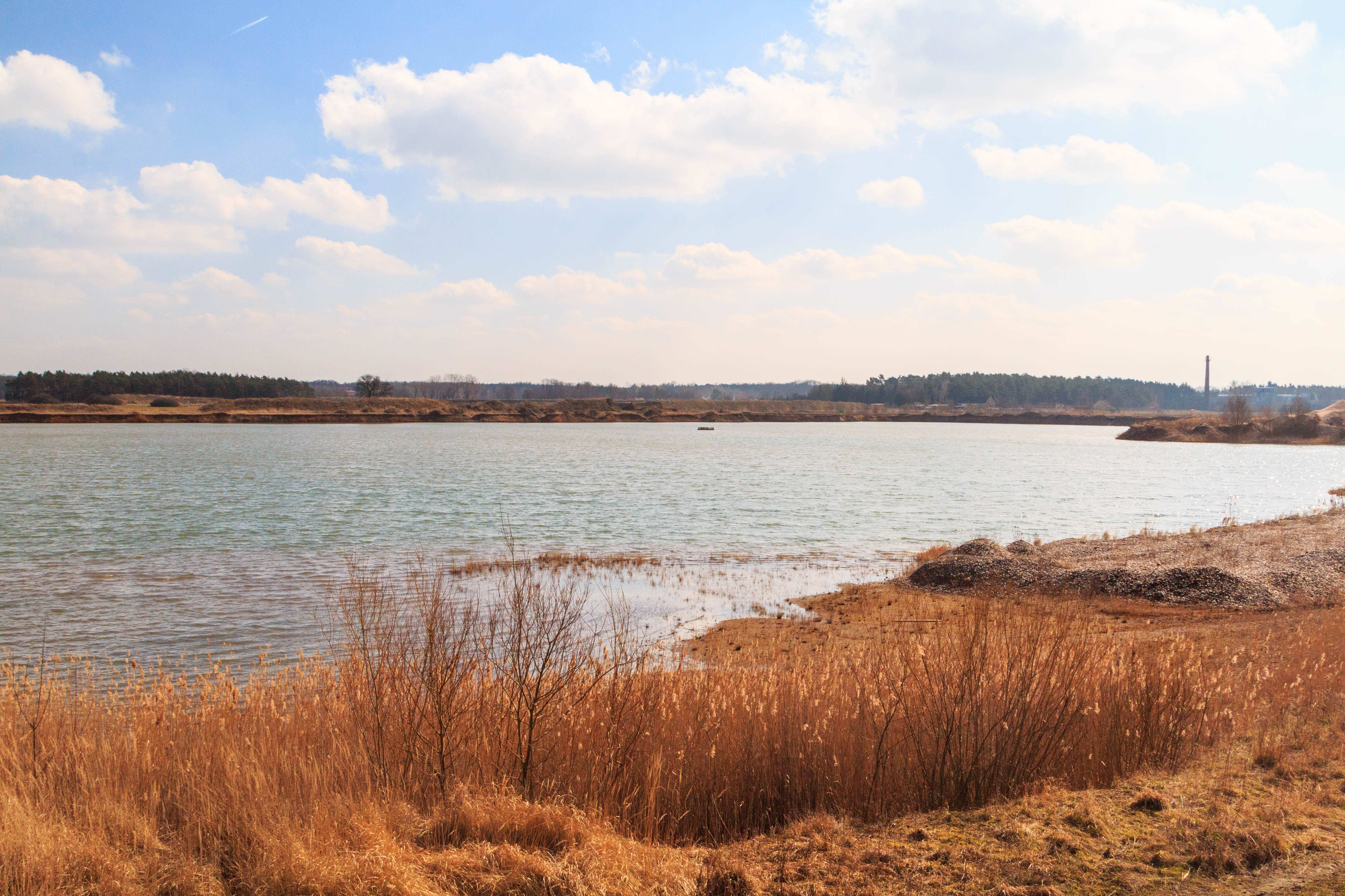 Pískovna Čeperka Project: Vodstvo.